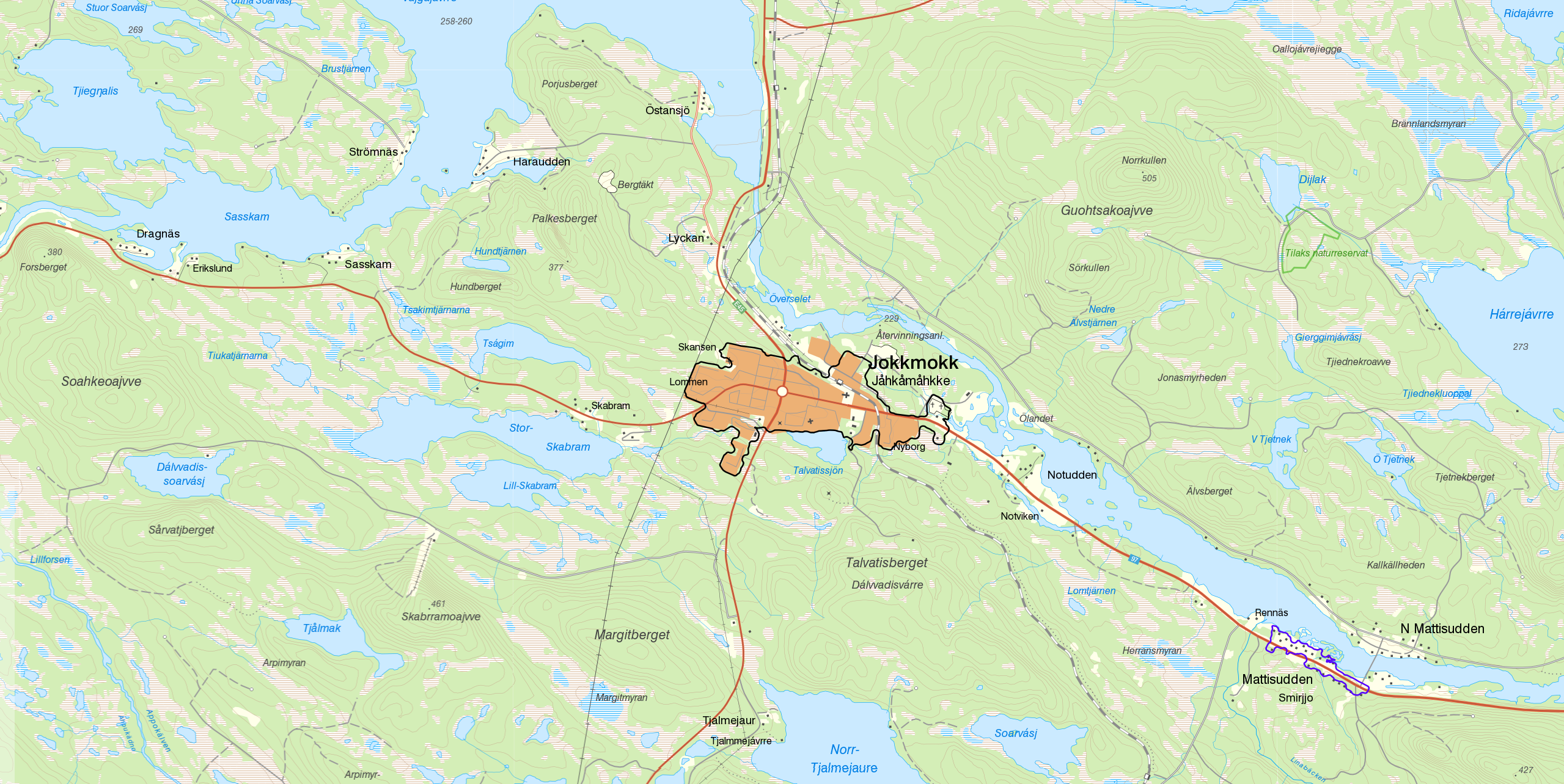 Tätorten Jokkmokk (svarta gränsen) och småorten Mattisudden (lila gränsen) i vid tätorts- och småortsavgränsningen 2015. Bakgrundskarta från Lantmäteriet, skala 1:30 236.